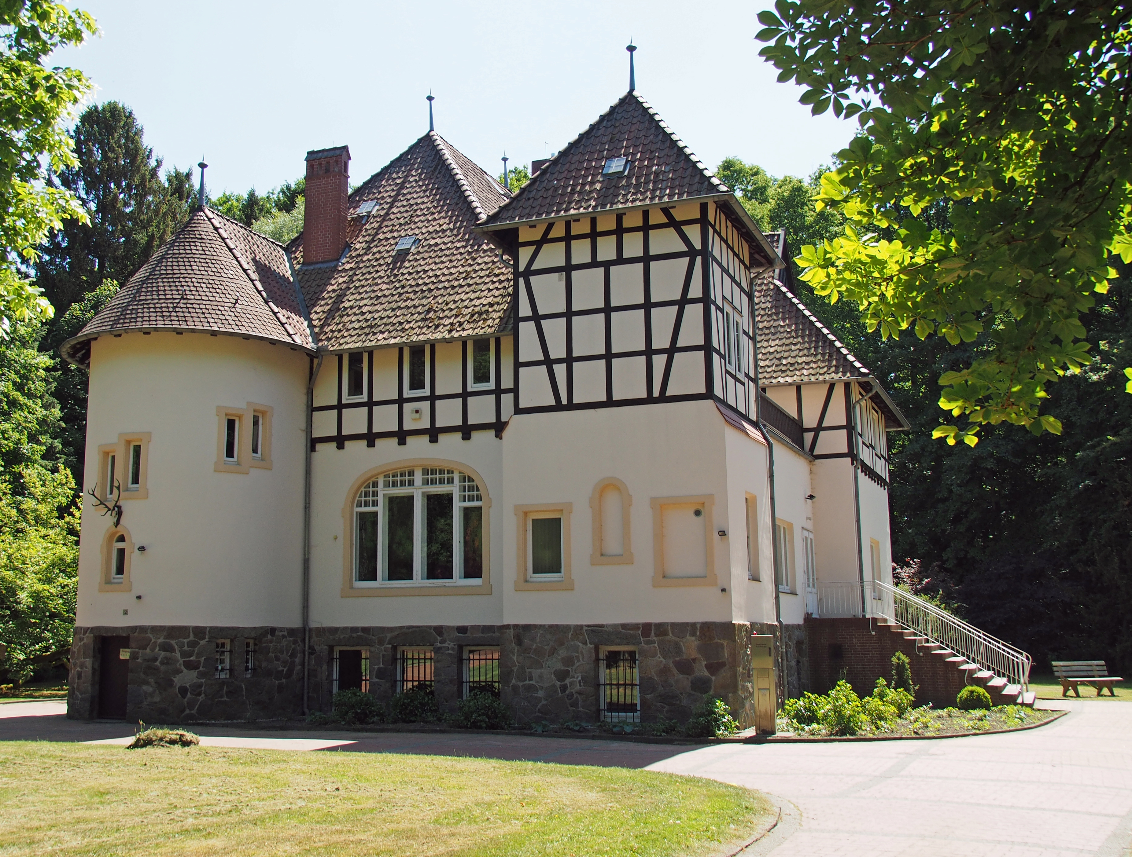 Gutshaus von 1907 in Wense (Osterheide) erbaut von Hilmer von der Wense (1864–1928)